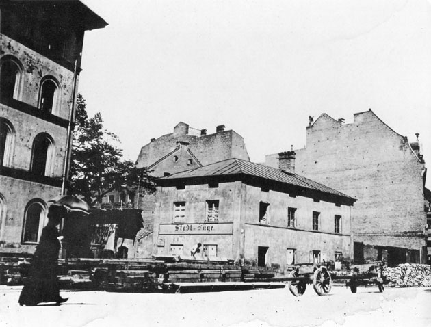 Stadtsäge im Lehel in München